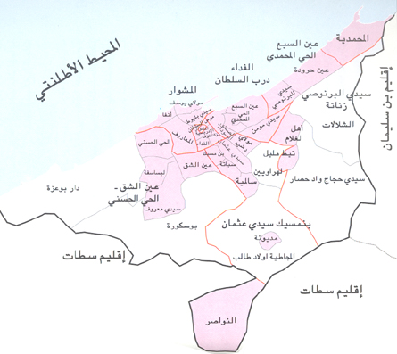 صورة تبين التقسيم الاداري لمدينة الدار البيضاء حسب المقاطعات و العمالات